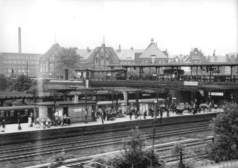 Zentralbild Ben-Schä Berlin im Mai 1950 Blick auf den Ring- und Stadtbahnhof Ostkreuz.